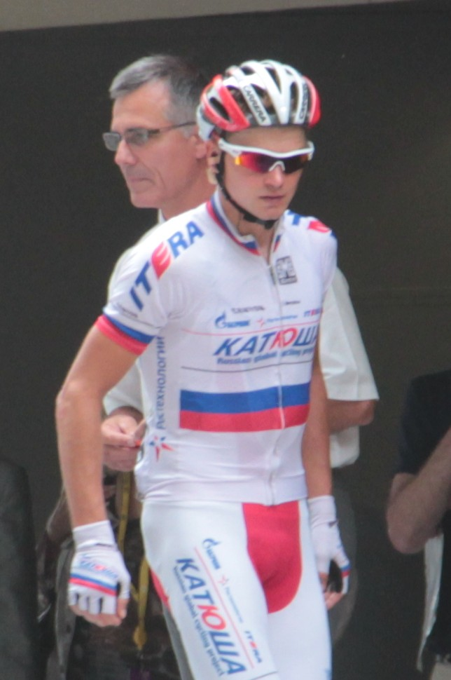 Eduard Vorganov avant le départ de la 18e étape du Tour de France 2012.